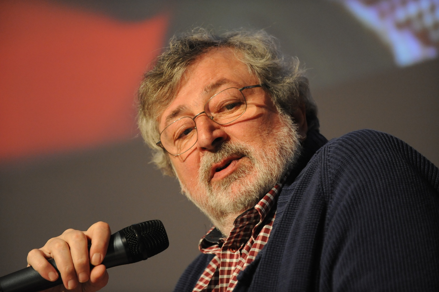 Francesco Guccini, Premio Chiara 2013